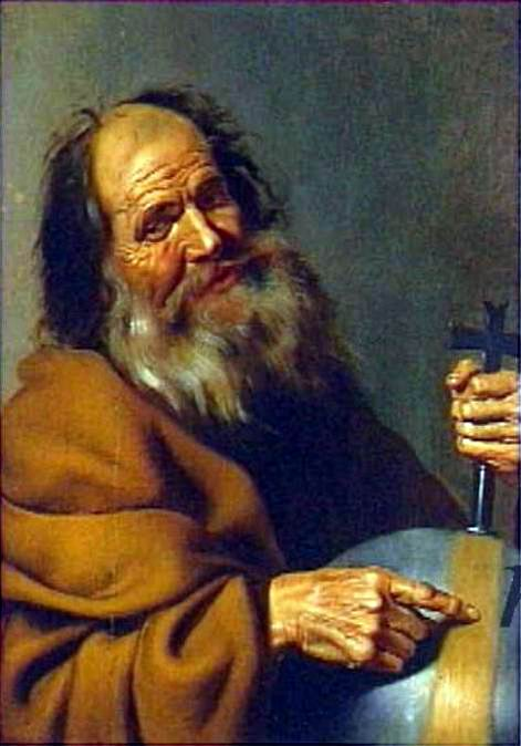 Demócrito